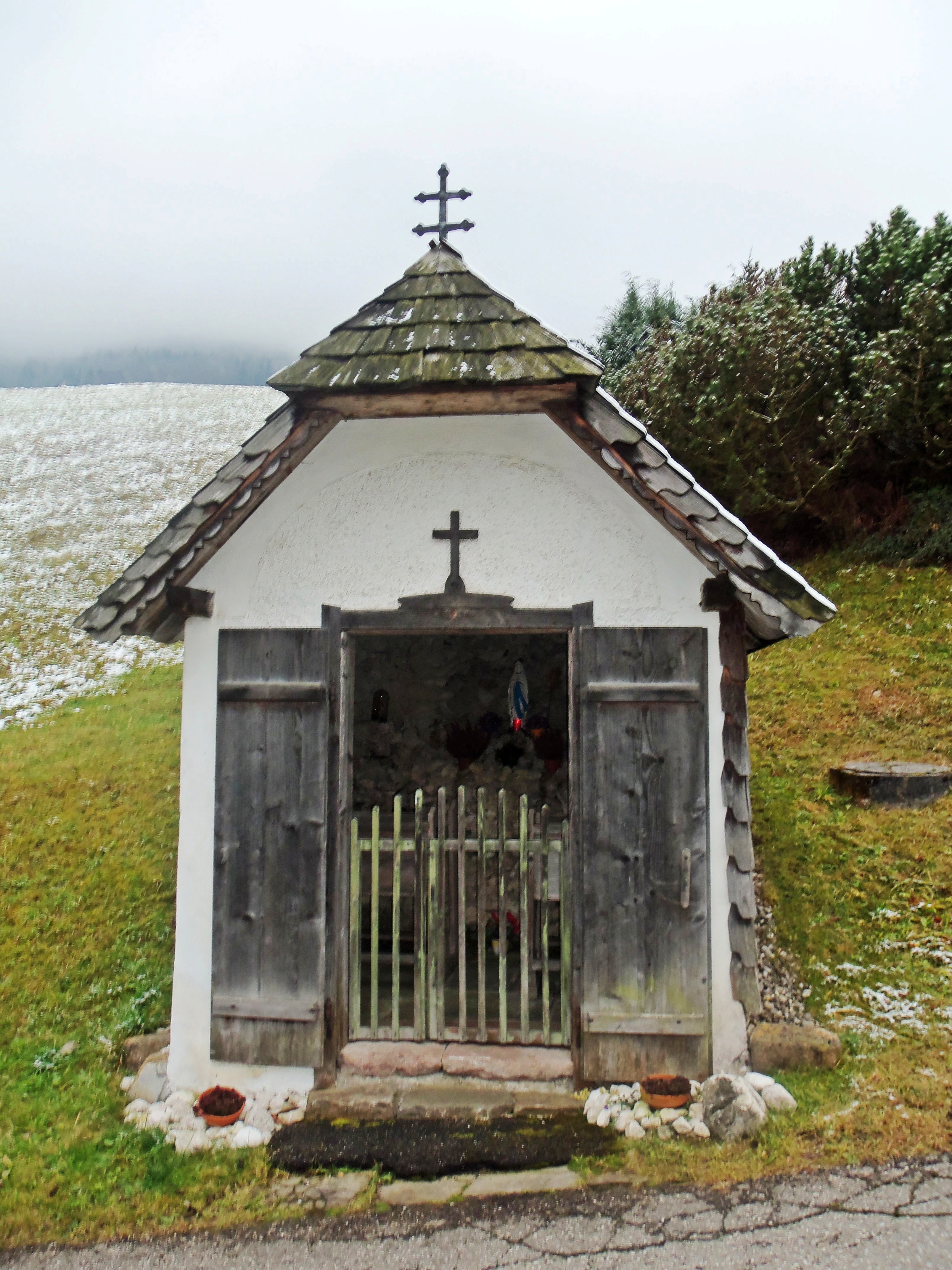 Rabenwies Kapelle